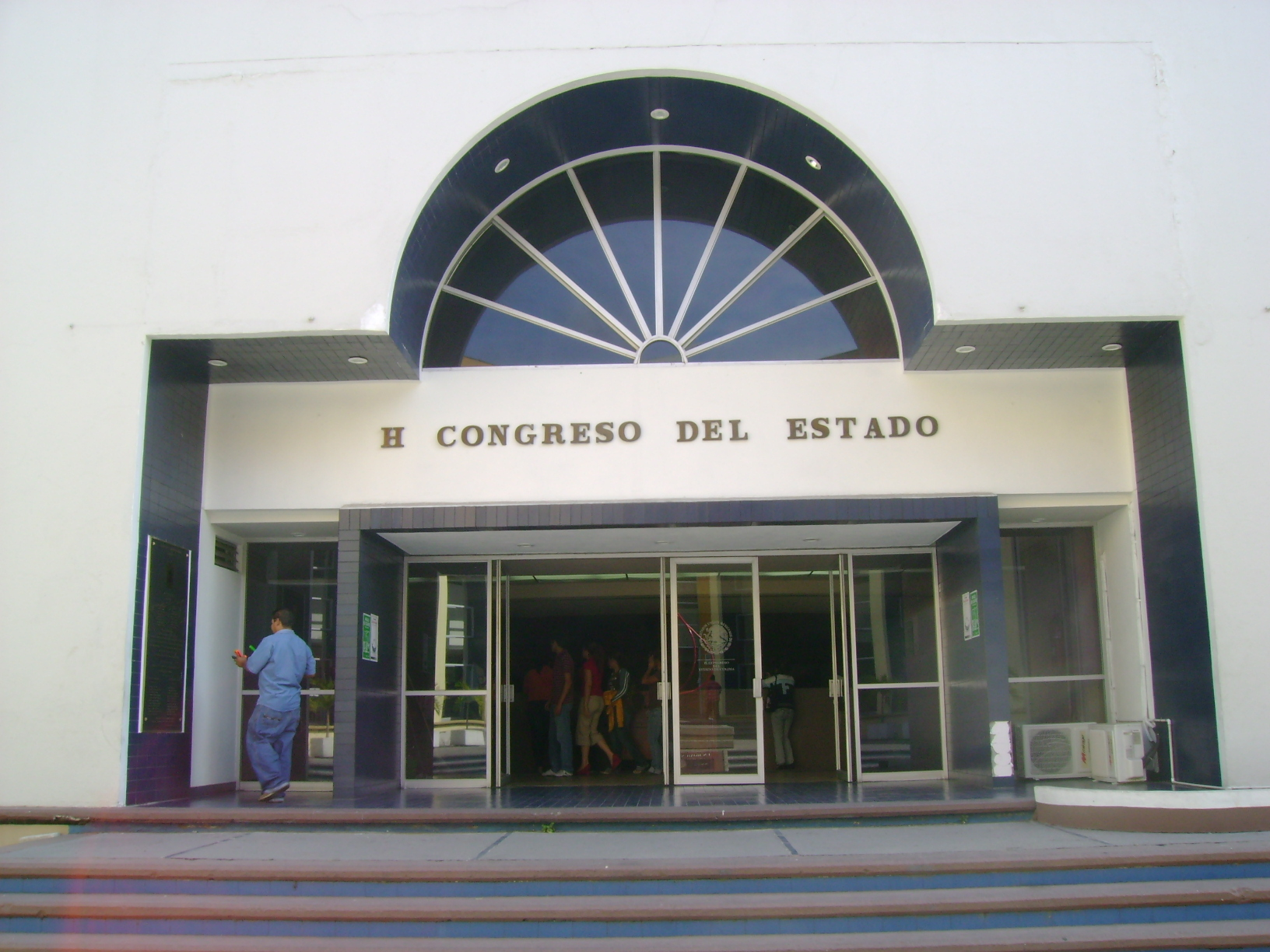 Congreso de Colima